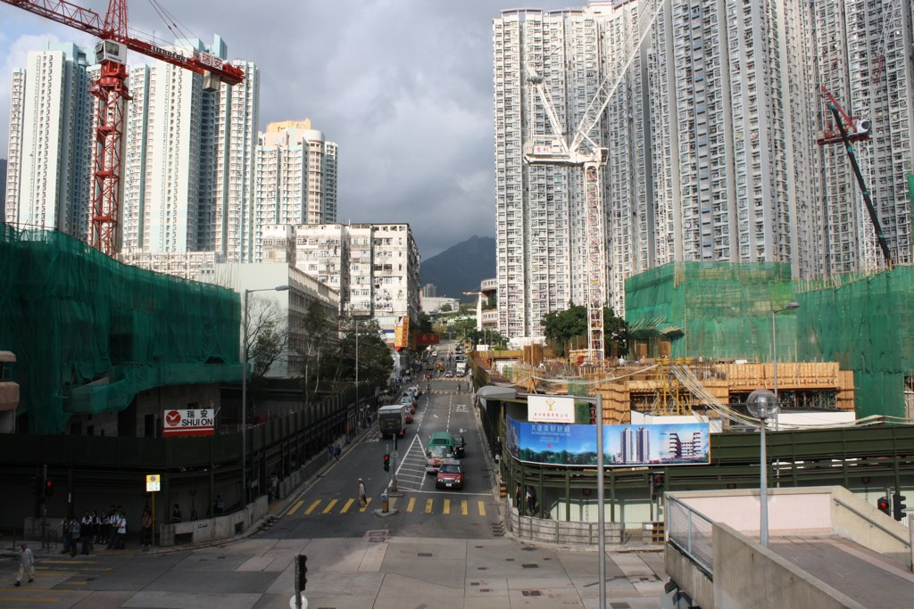 Shek Kip Mei Estate Site 石硤尾邨